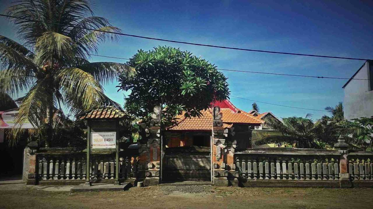 Gereja GKPB Suluh Kasih Tampak dari Depan